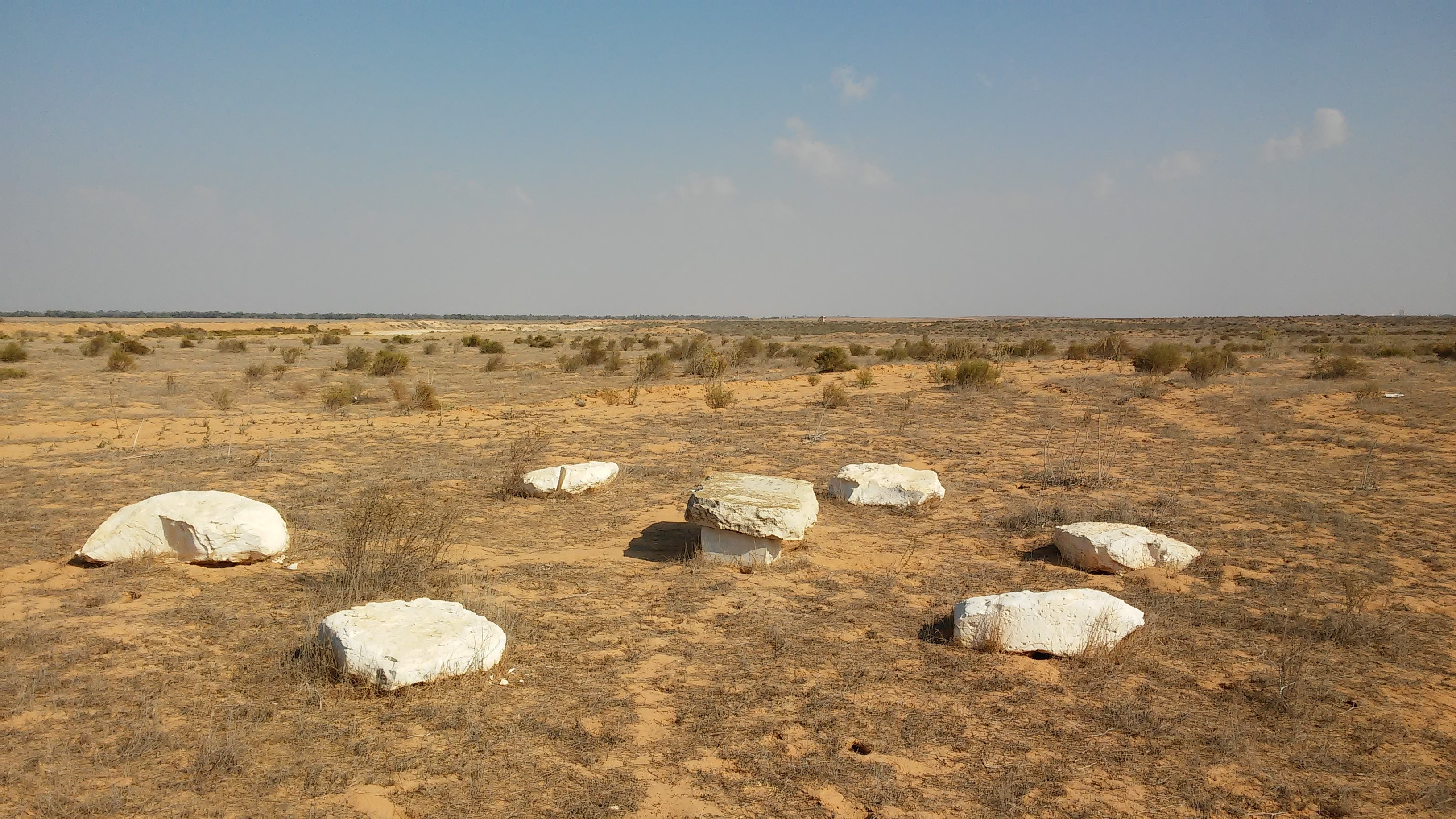 ציון אתר העלייה לקרקע של קבוצת אורים במסגרת עליית 11 הנקודות בנגב במוצאי יום כיפור תש"ז